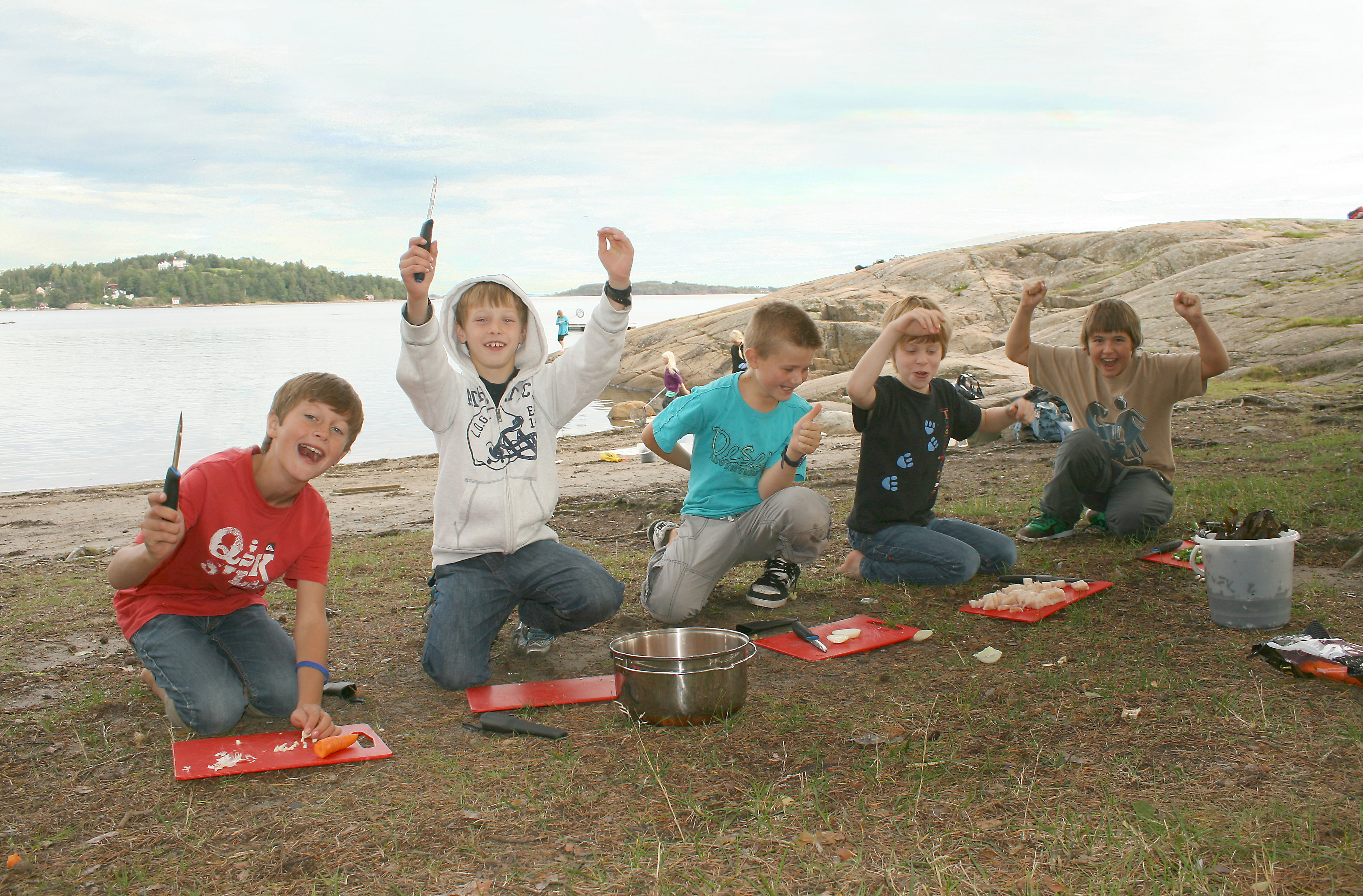 OF har flere instruktører og har vært år flere tusen barn og pedagoger med ut. Matlaging ute er en av mange aktiviteter, her fra Fjærholmen på Nøtterøy.